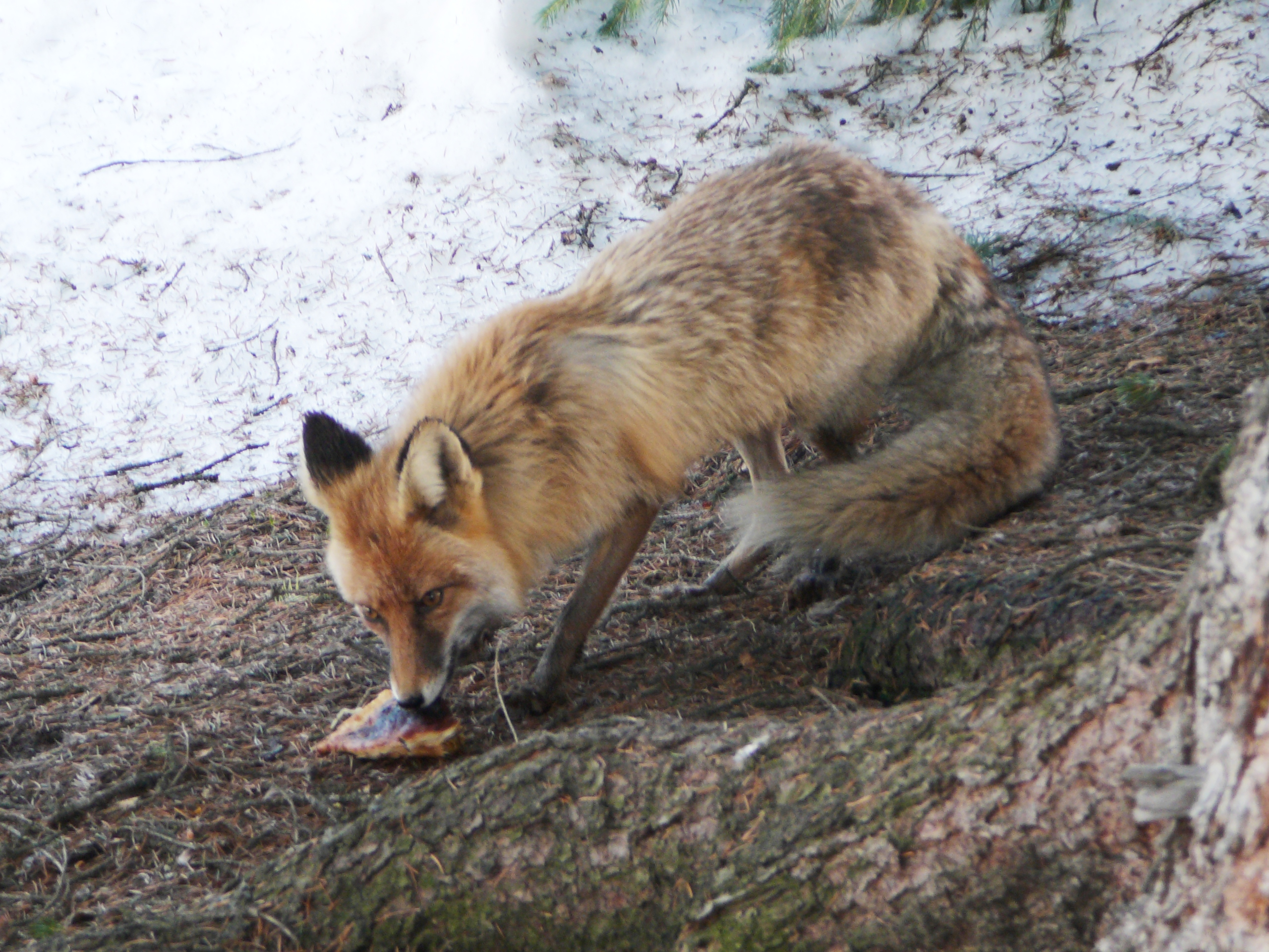 Лисица прикормленная туристами поедает чебурек. Снято в ущелье Туюк-Су на 2 километра выше горнолыжного комплекса "Чимбулак" в 20 километрах от г.Алма-Ата. Видеоролик с кормлением лисицы на